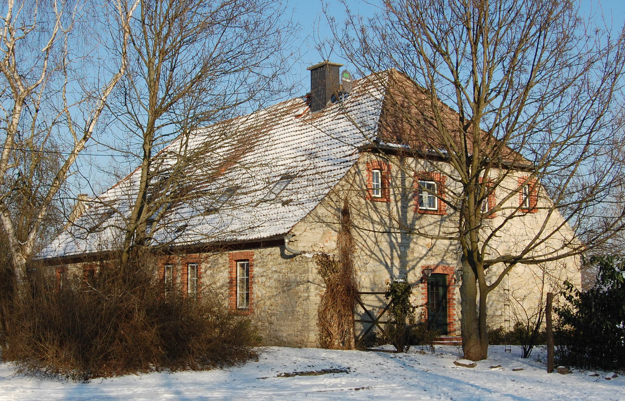 Haus in der Ladenstraße in Wanzleben-Buch